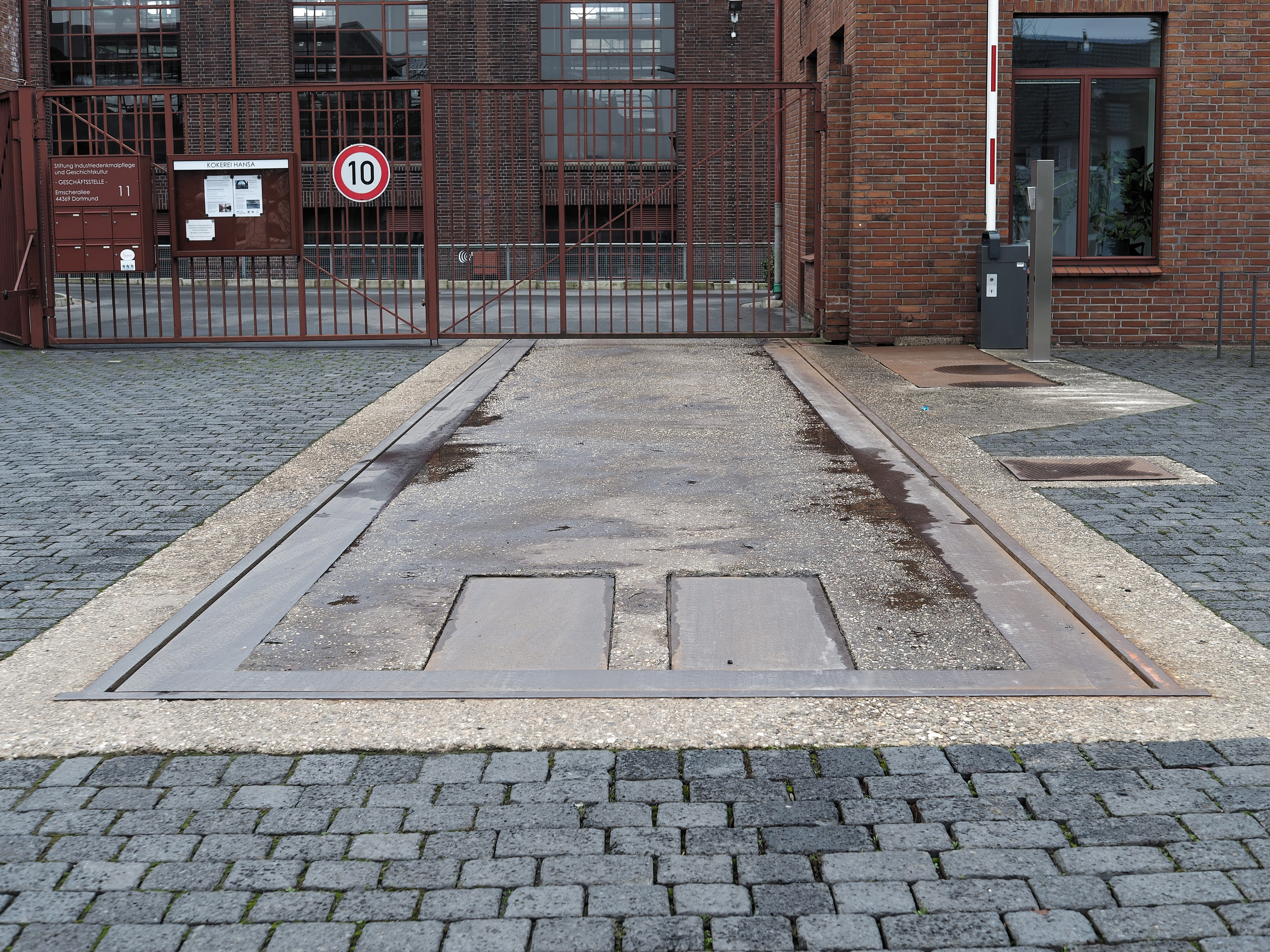 Kokerei Hansa in Dortmund-Huckarde, Emscheralle 11, Kokswagenwaage am Werkstor.